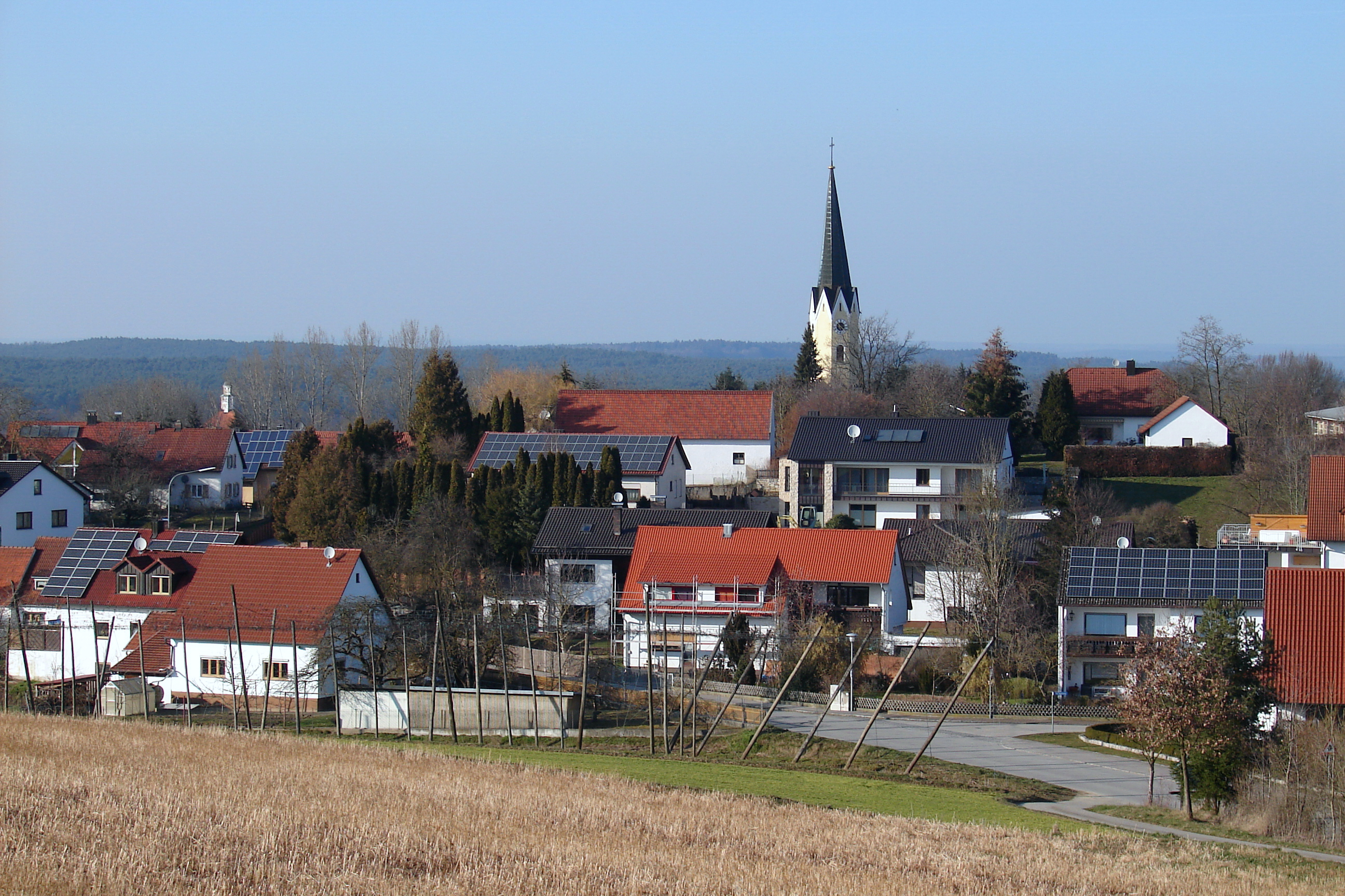 Train ist eine Gemeinde im niederbayerischen Landkreis Kelheim. Sie gehört zur Verwaltungsgemeinschaft Siegenburg.